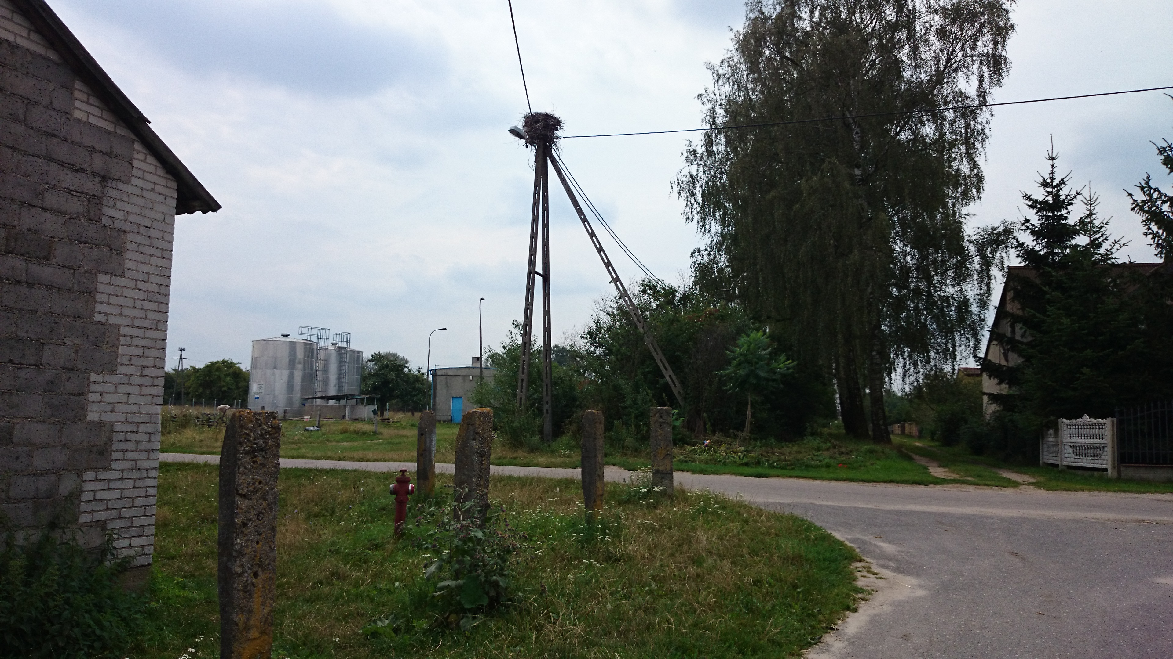 Stupsk - bocianie gniazdo